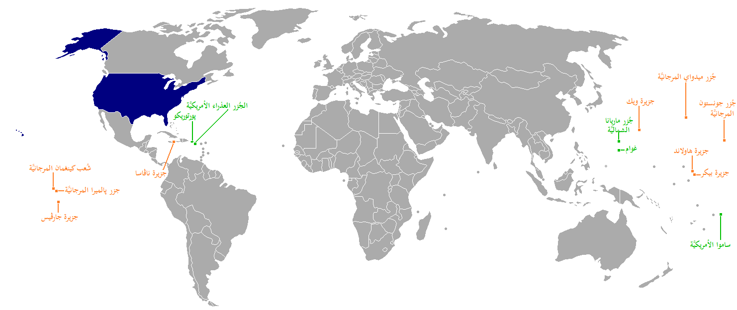 خارطة تُظهر الأقاليم الأمريكيَّة الرسميَّة وتلك التي تُسيطر عليها الولايات المُتحدة. الولايات الخمسون والعاصمة مُلونة بالأزرق الداكن، وأقاليم ما وراء البحار المأهولة مُلونة بالأخضر، وتلك غير المأهولة مُلونة بالبُرتُقالي.